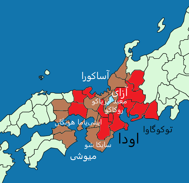 map of Sengoku period 1570